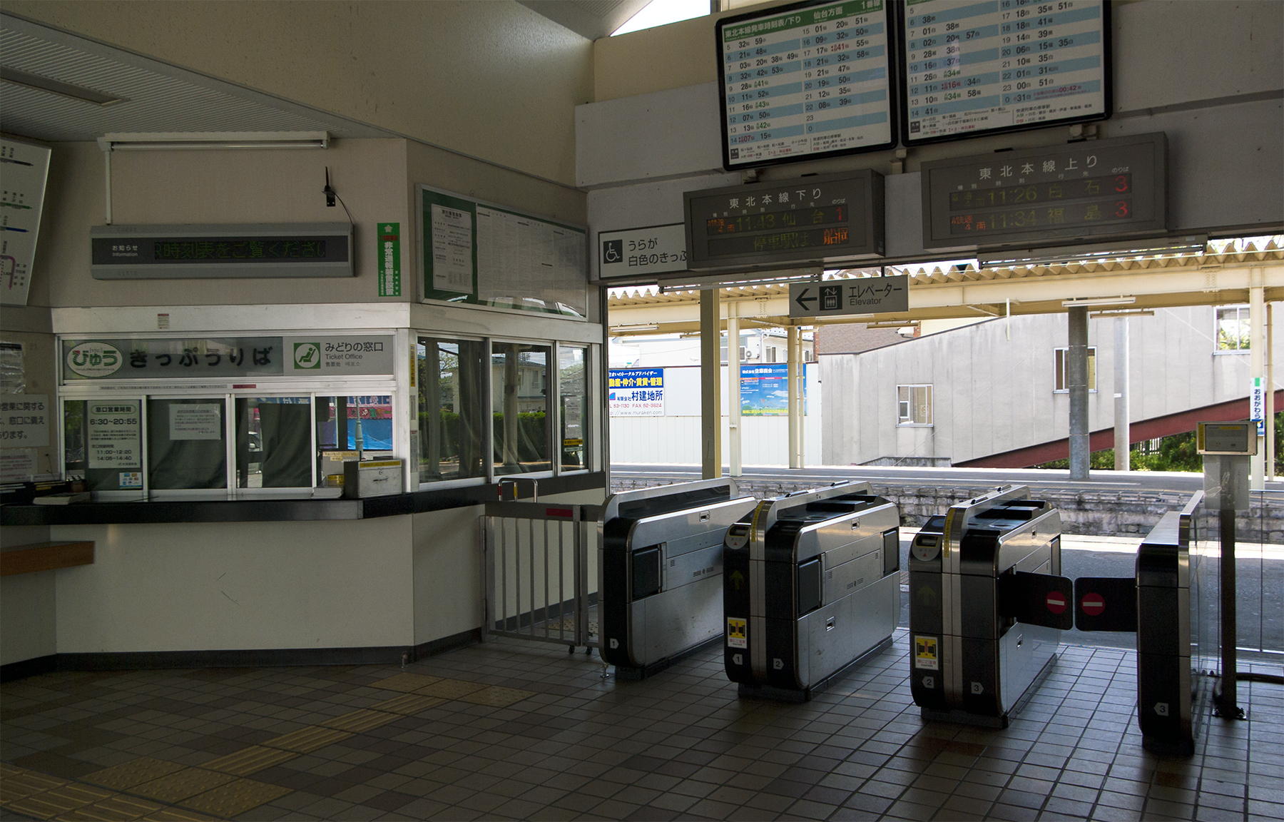 東日本旅客鉄道株式会社東北本線大河原駅